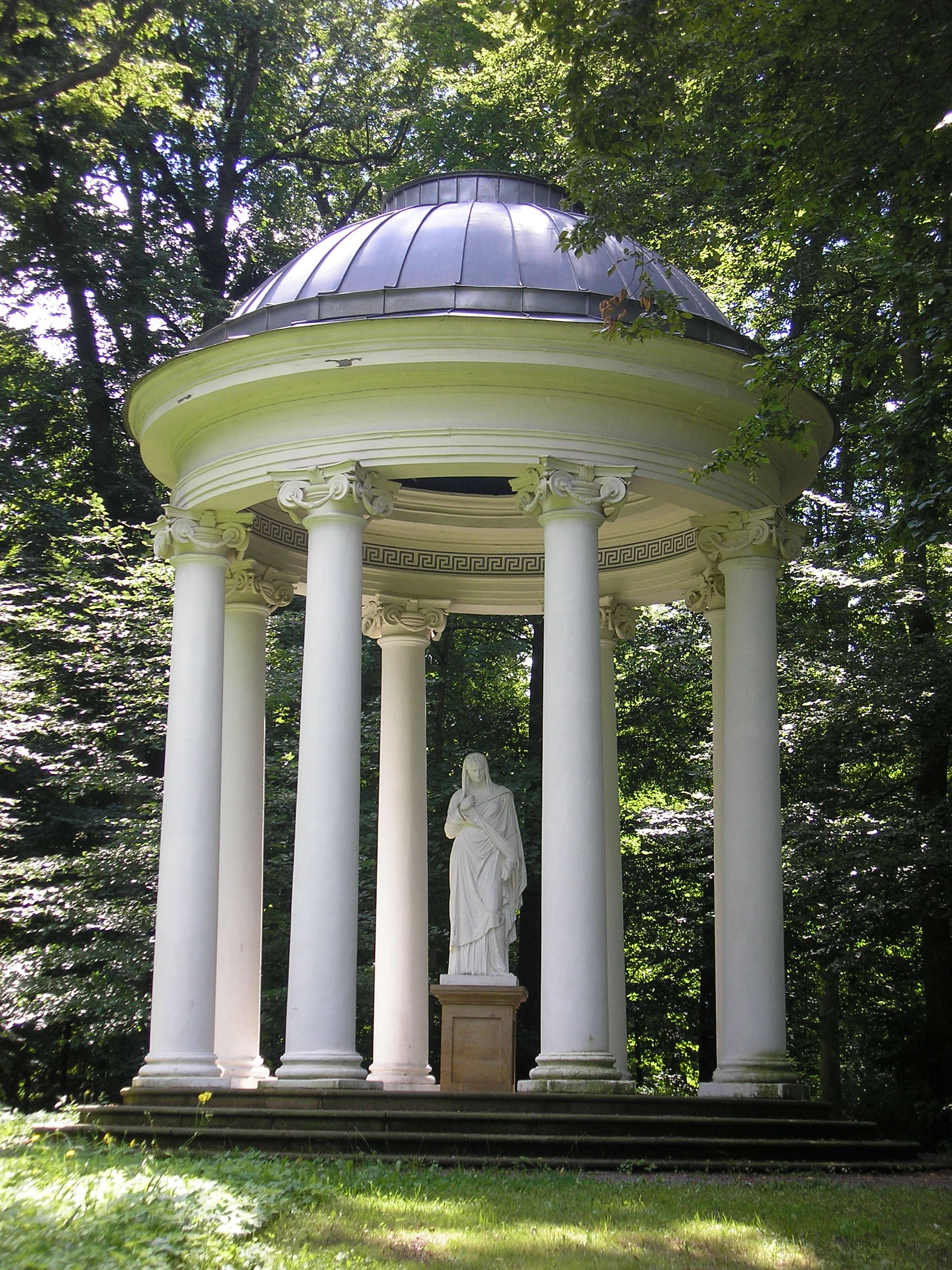 Ein Tempel im Park in Bad Köstritz (Thüringen).